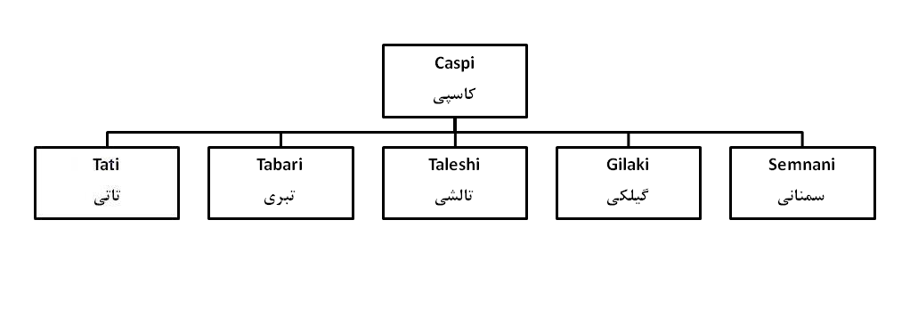 Caspian Languages - زبان هاي كاسپيان